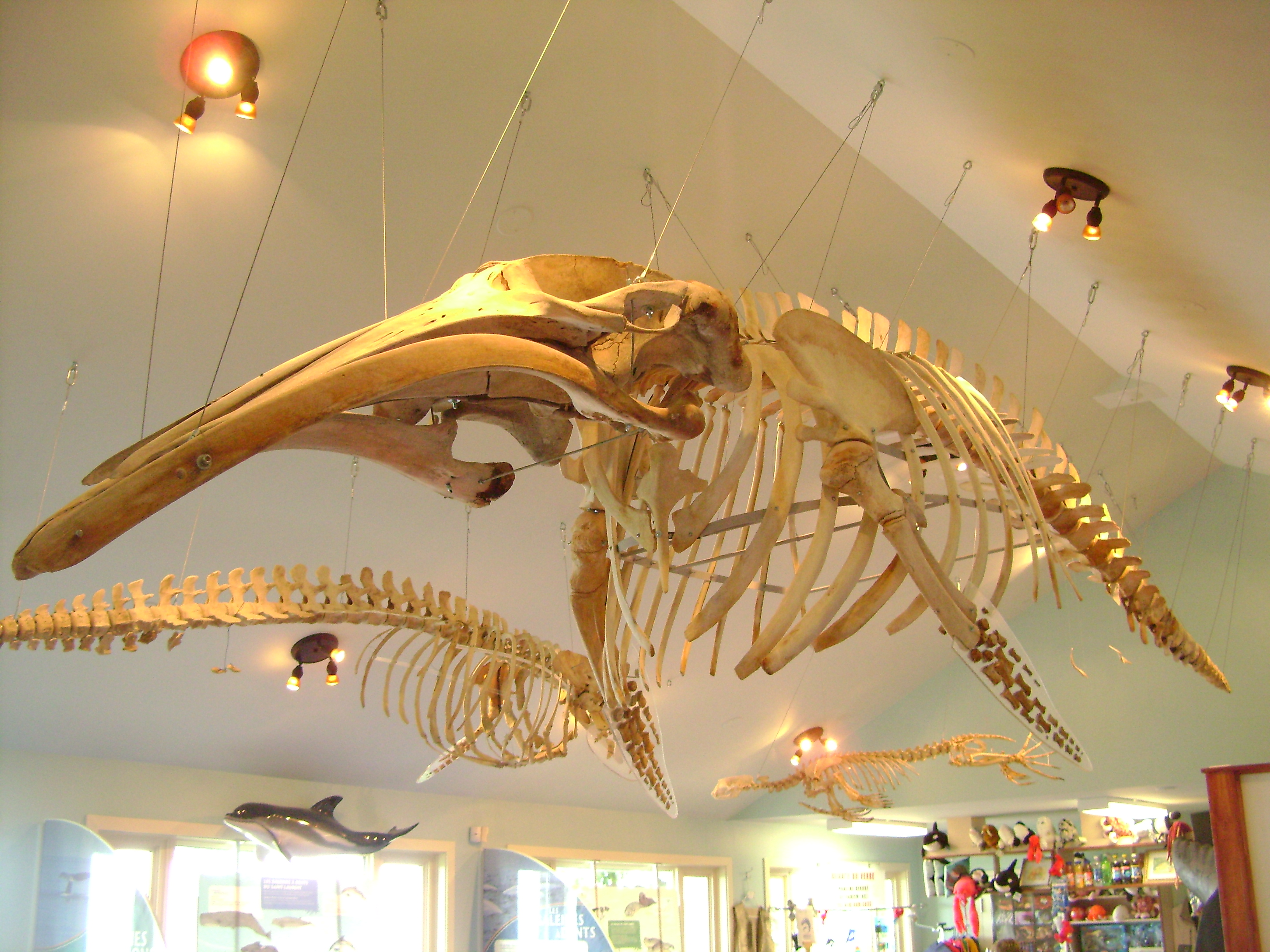 Squelette de petit rorqual de l'Atlantique Nord retrouvé mort échoué près de Sainte-Flavie et exposé à la Station exploratoire du Saint-Laurent à Rivière-du-Loup, au Québec